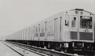 大阪市交通局 10系電車 第1編成